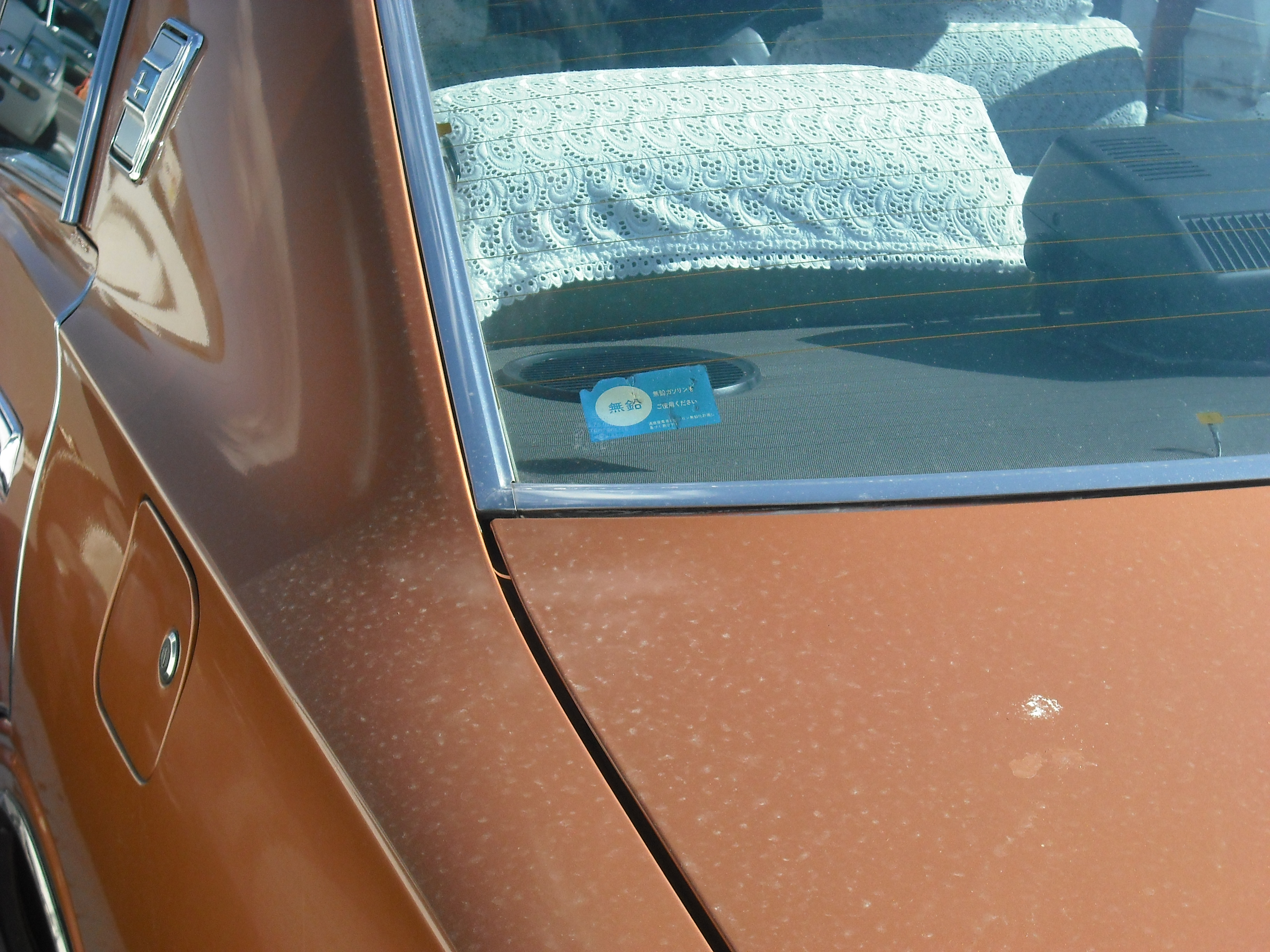 市立旭川病院駐車場にて、所有者（友人）より撮影及び投稿許可済